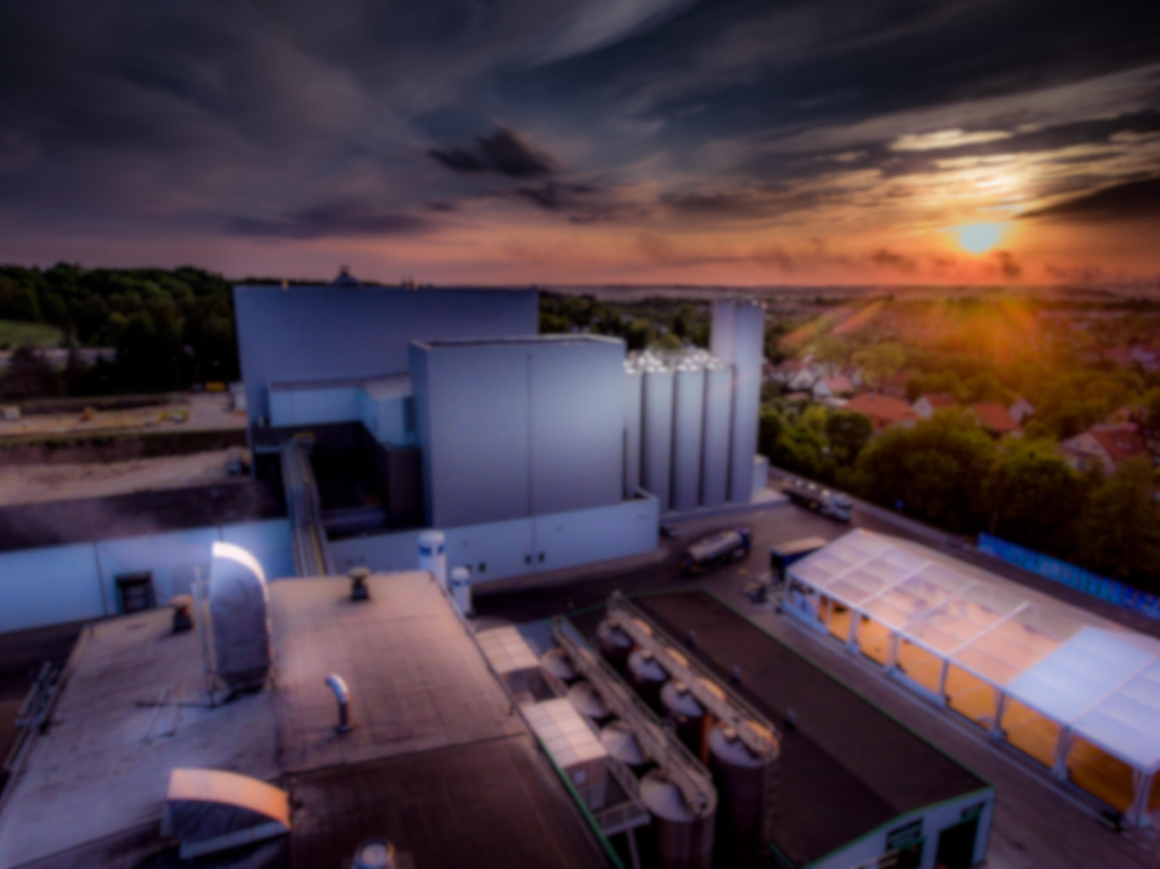 Zakład Grupy Polmlek o zachodzie słońca